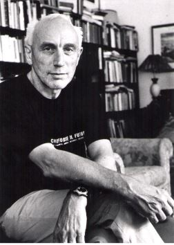 Porträt Bernd Dewe